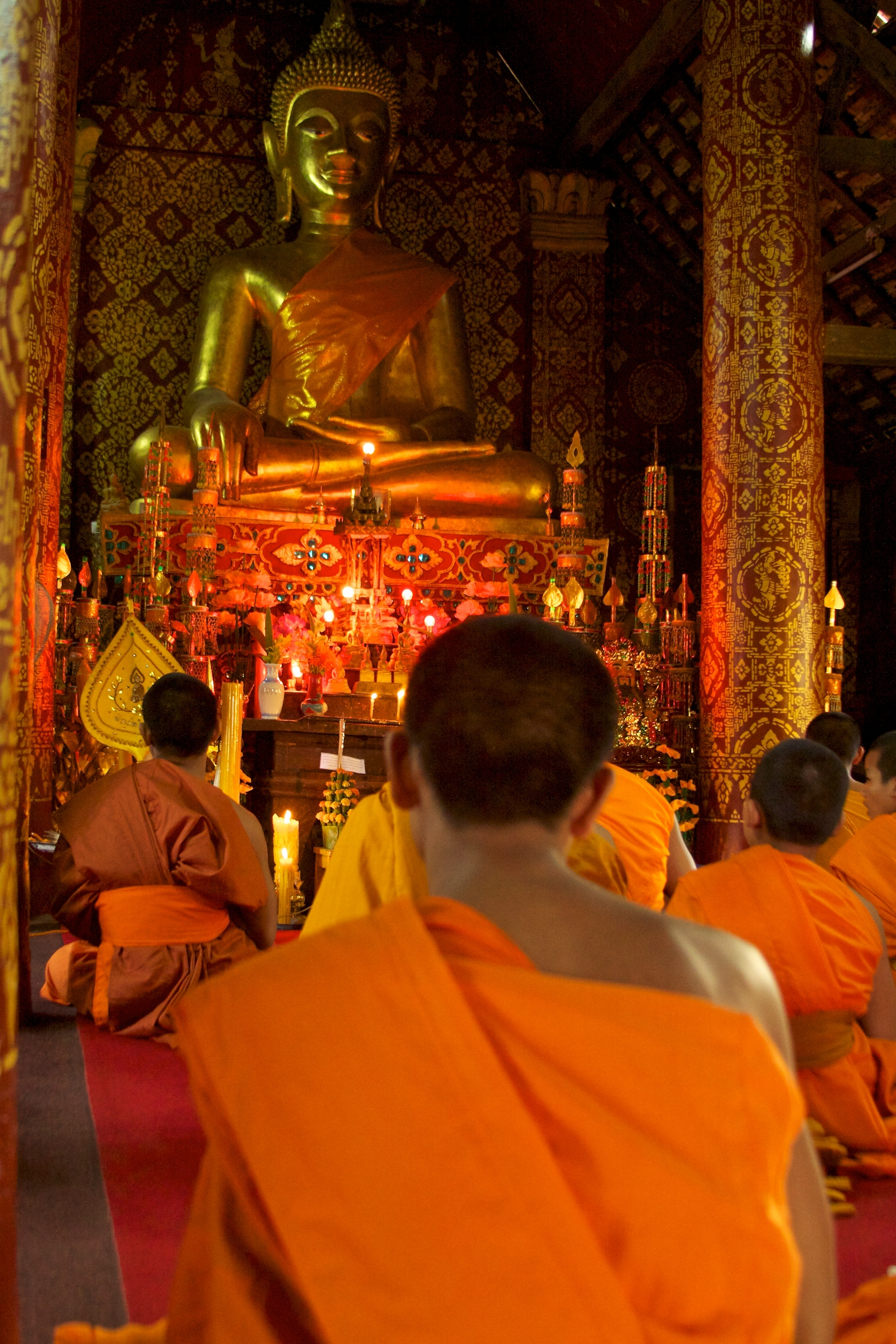 Laos - Luang Prabang 83 - young monk at afternoon prayer